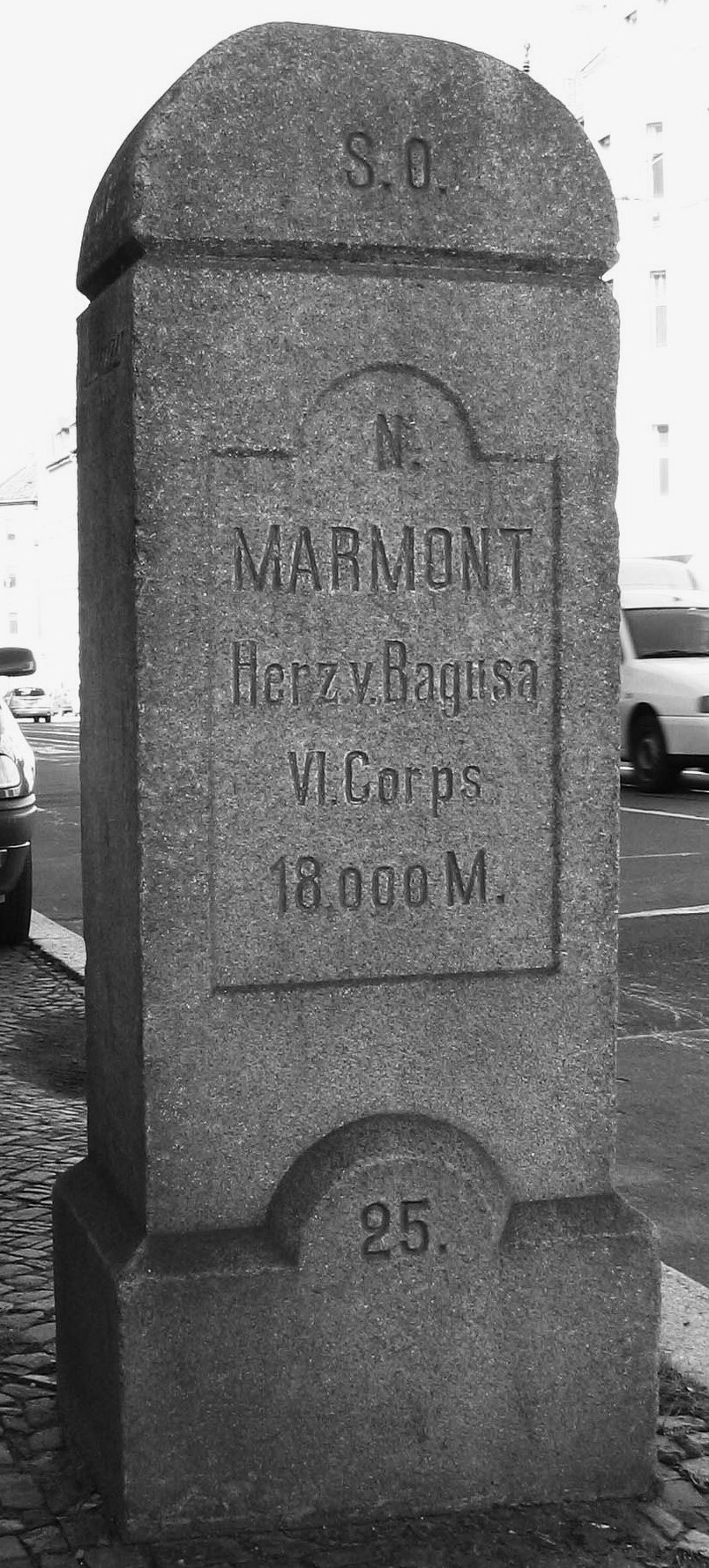 Apelstein 25 zur Schlacht bei Möckern (Völkerschlacht), Dr. Theodor Apel 1863 - Seite 1.